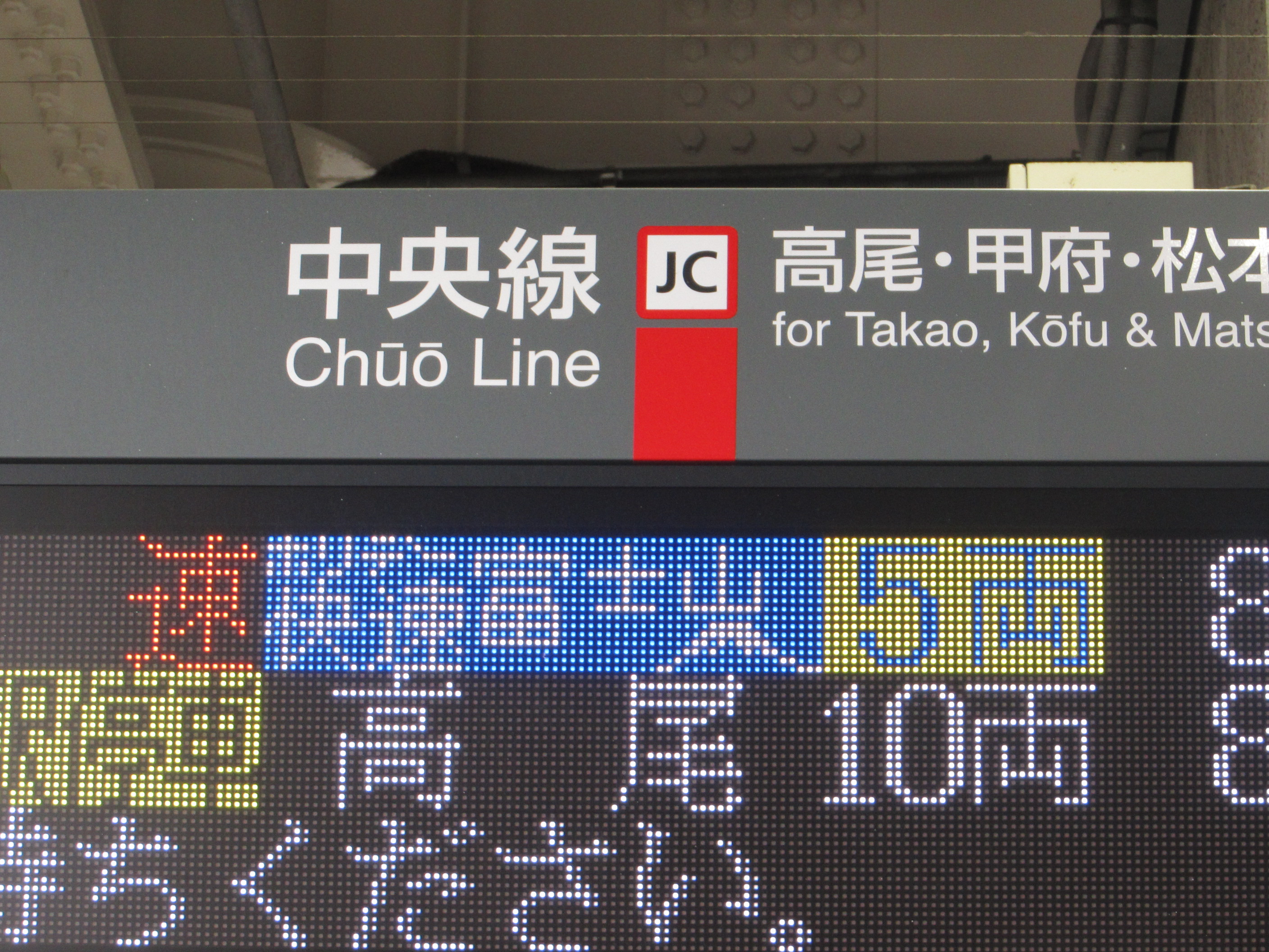 ホリデー快速富士山の電光掲示板による案内。